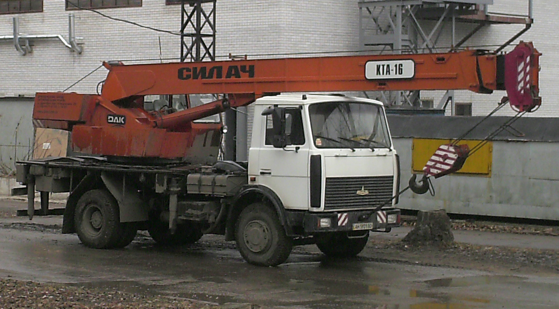 Автомобільний кран: Автомобільний кран Дрогобицького заводу на території НКМЗ